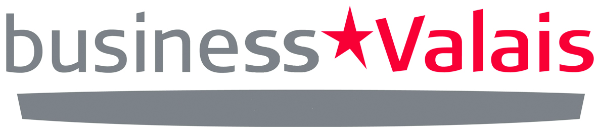 Logo du service Business Valais